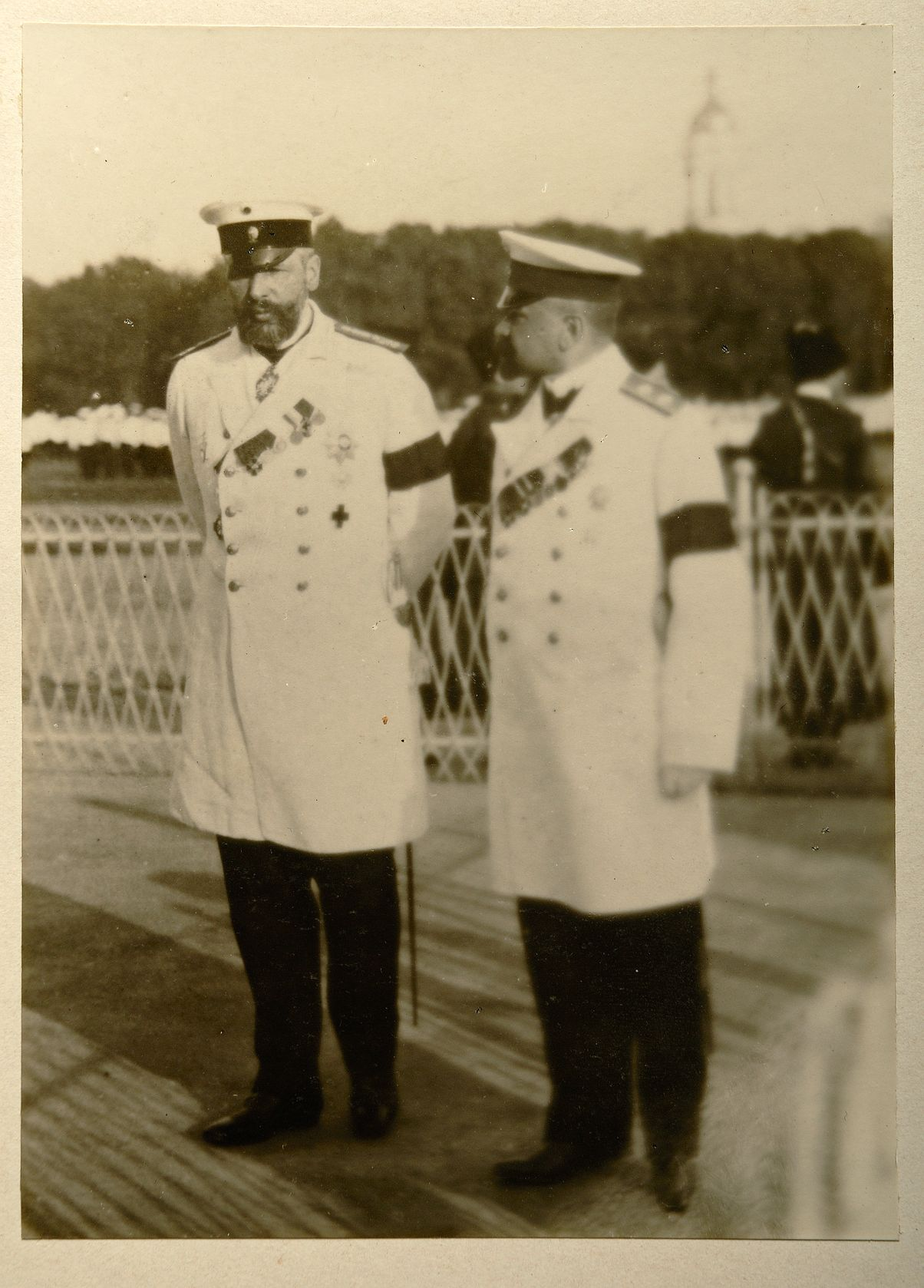 Киев. Российский министр Столыпин П.А.(слева) за несколько часов до смертельного покушения. 1(15) сентября 1911г.